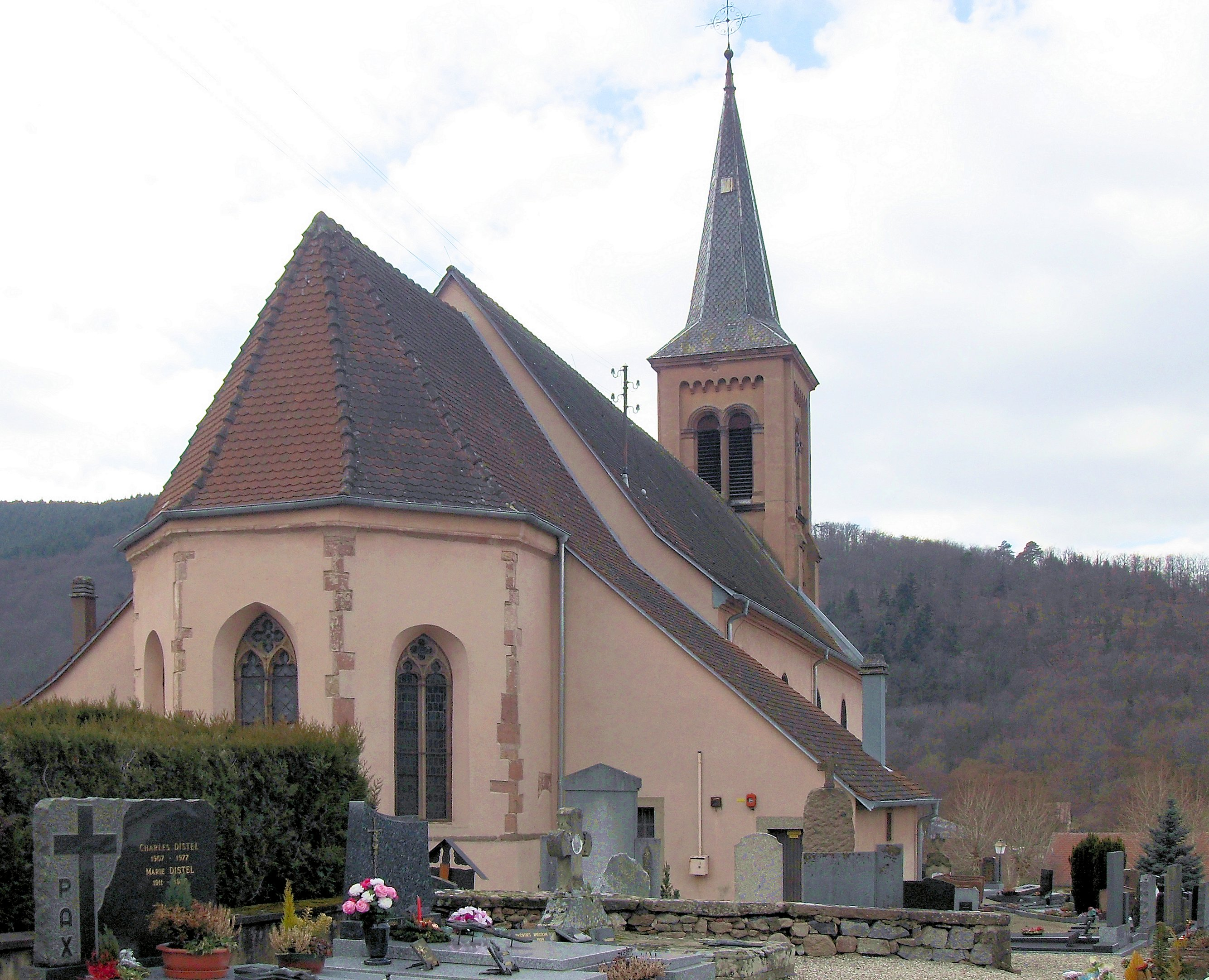 L'église Saint-Jean-Baptiste à Soultzbach-les-Bains